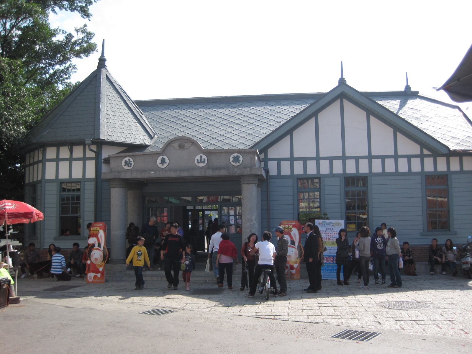 臺糖旗尾線旗山車站